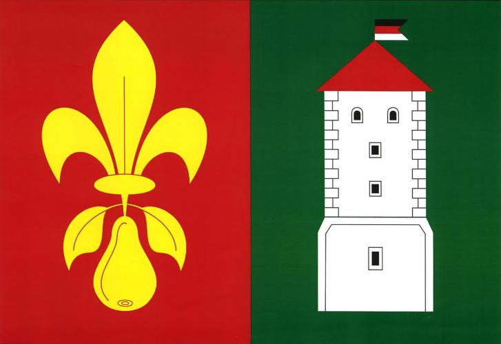 vlajka, Hrušov, okres Mladá Boleslav